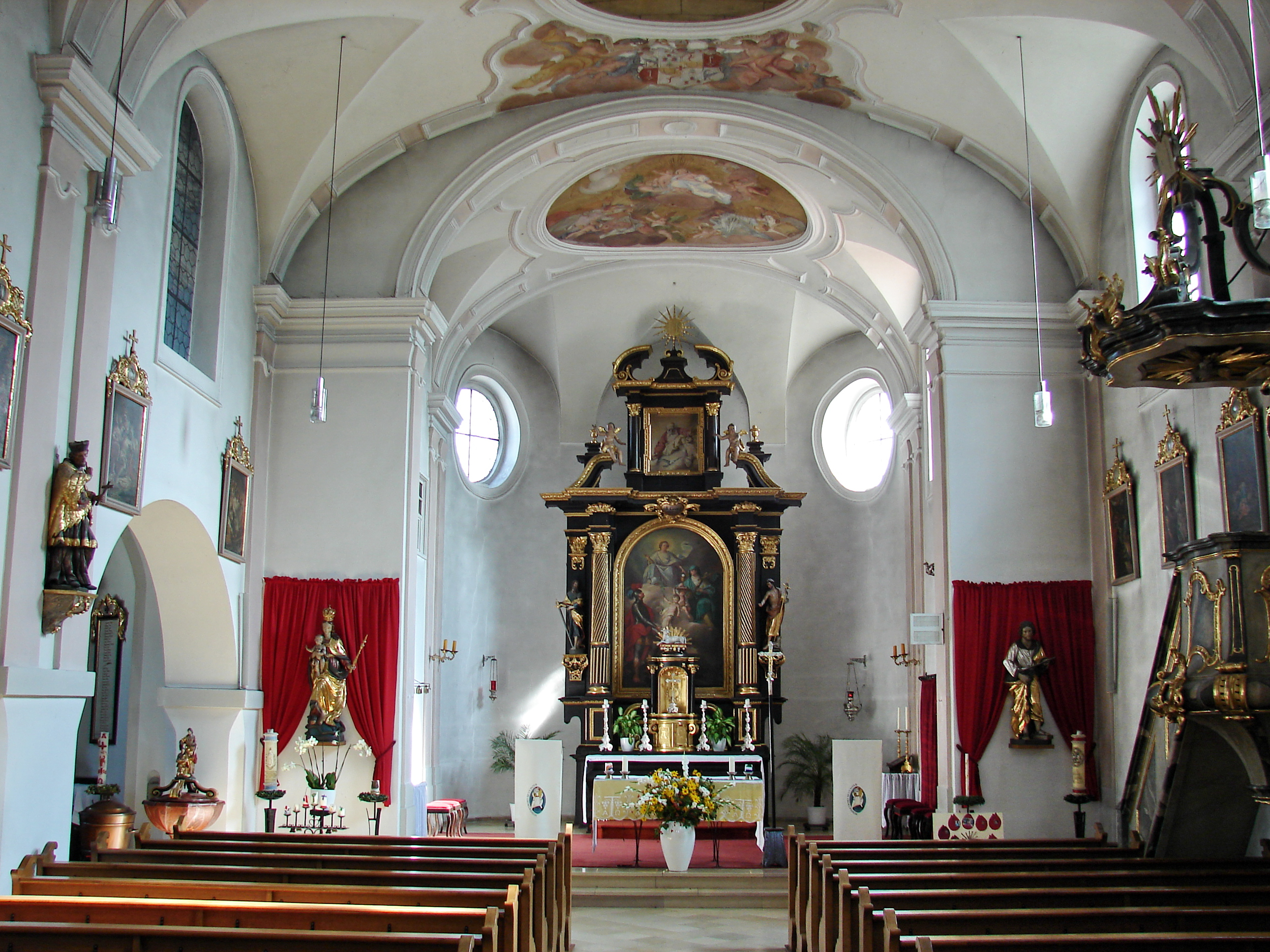 Die katholische Pfarrkirche St. Georg im Stadtteil Schwabelweis.